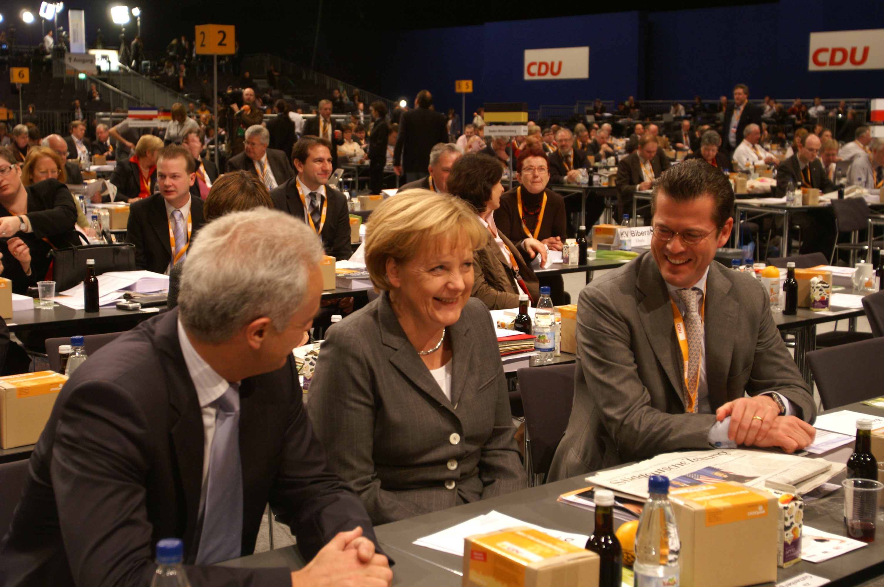 Dr. Peter Ramsauer, Vorsitzender CSU-Landesgruppe MdB, Dr. Angela Merkel, CDU-Parteivorsitzende und Bundeskanzlerin und Karl-Theodor Freiherr von und zu Guttenberg, CSU-Generalsekretär MdB